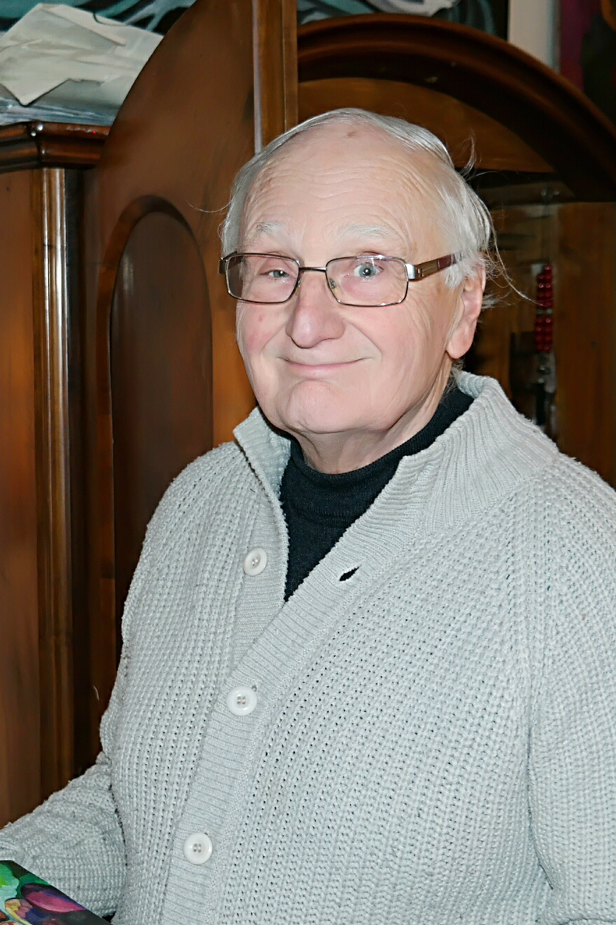 der österreichische Heimatforscher und Künstler Herbert Puschnik